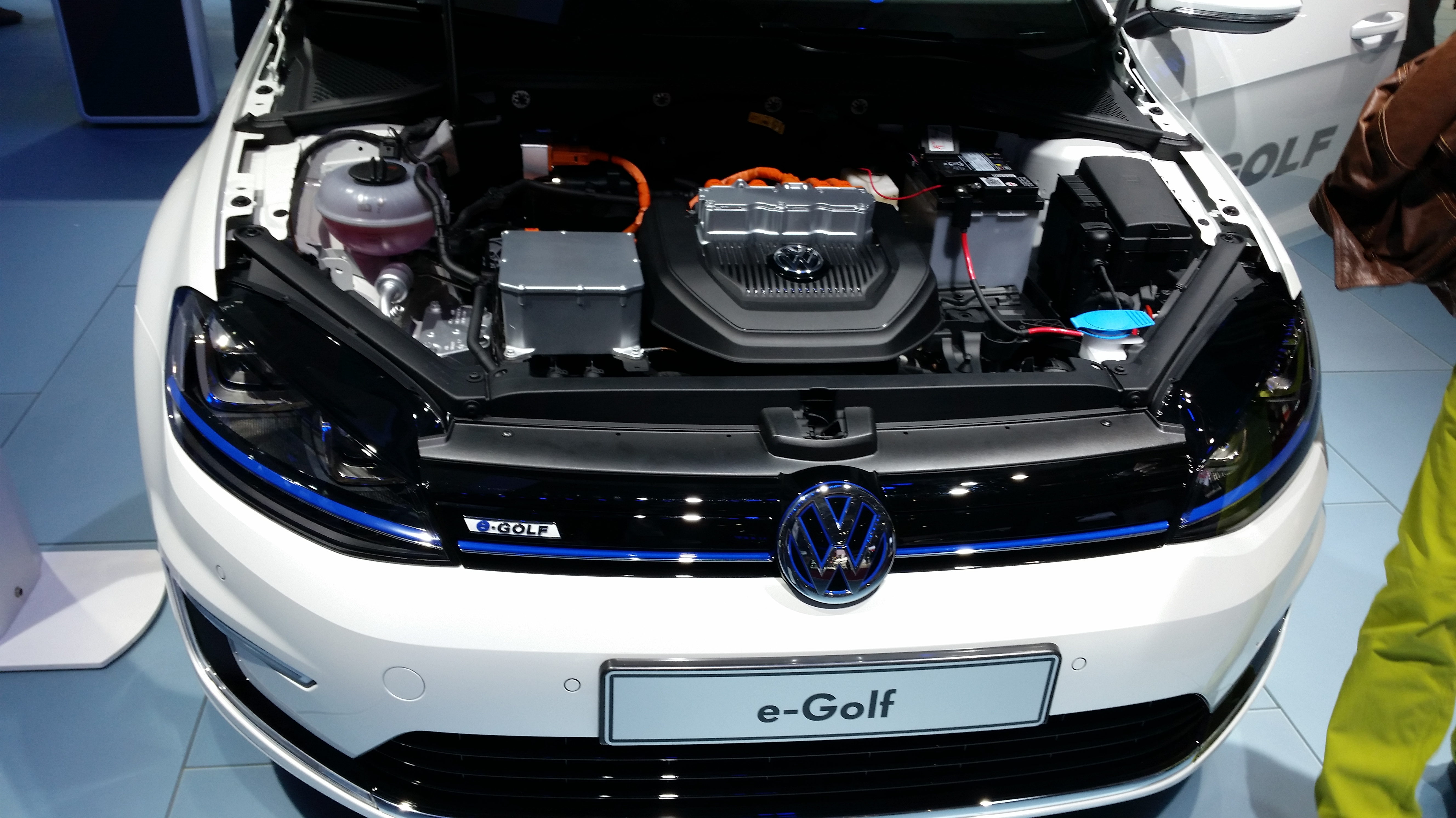 Volkswagen e-Golf sous le capot. Moteur électrique.